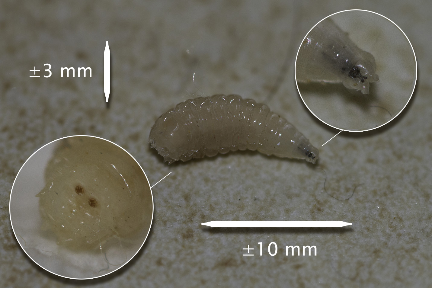 Asticot, photo macro avec face avant et face arrière